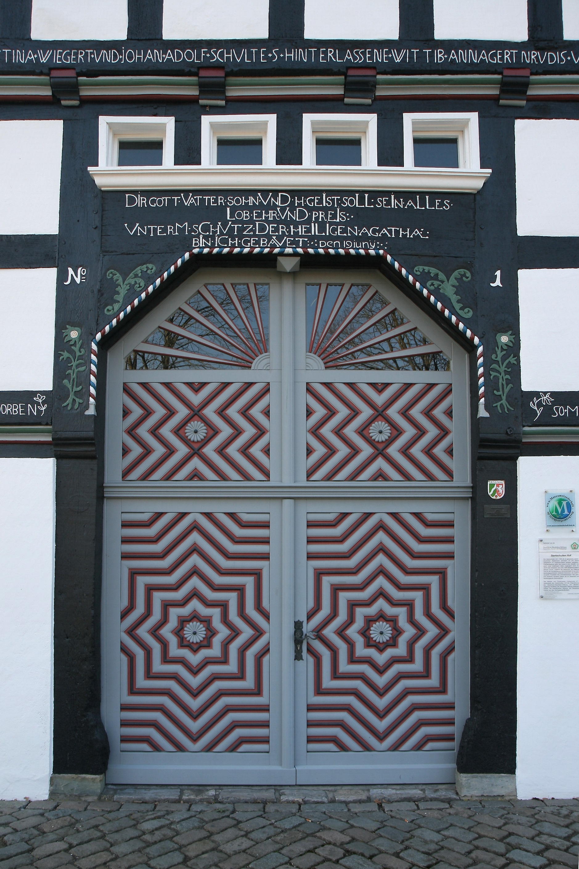 Stertschultenhof in Eslohe-Cobbenrode, Olper Str. 3.